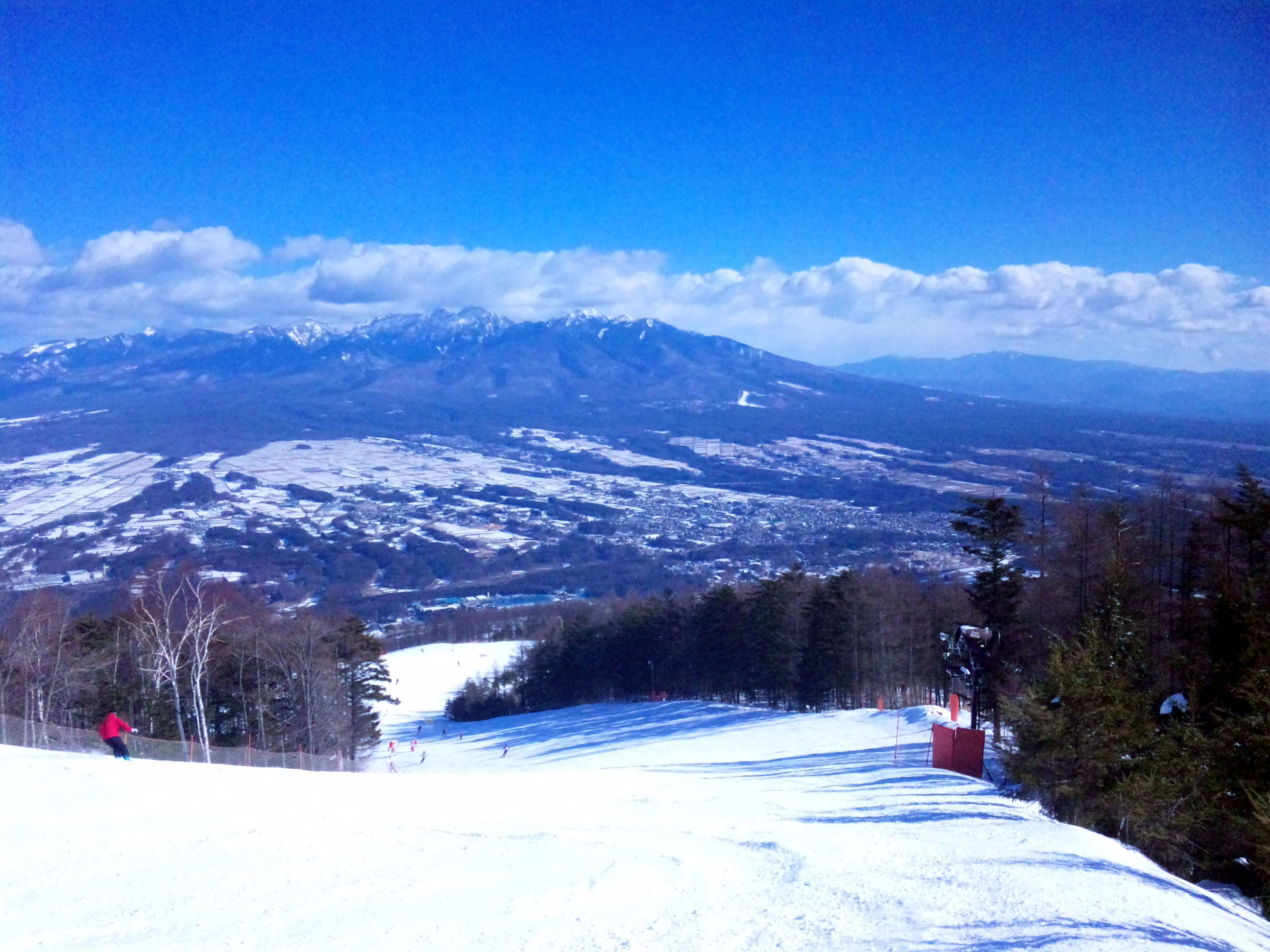 富士見パノラマスキー場からみた八ヶ岳連峰 私の携帯電話ドコモSH-01Bにて撮影